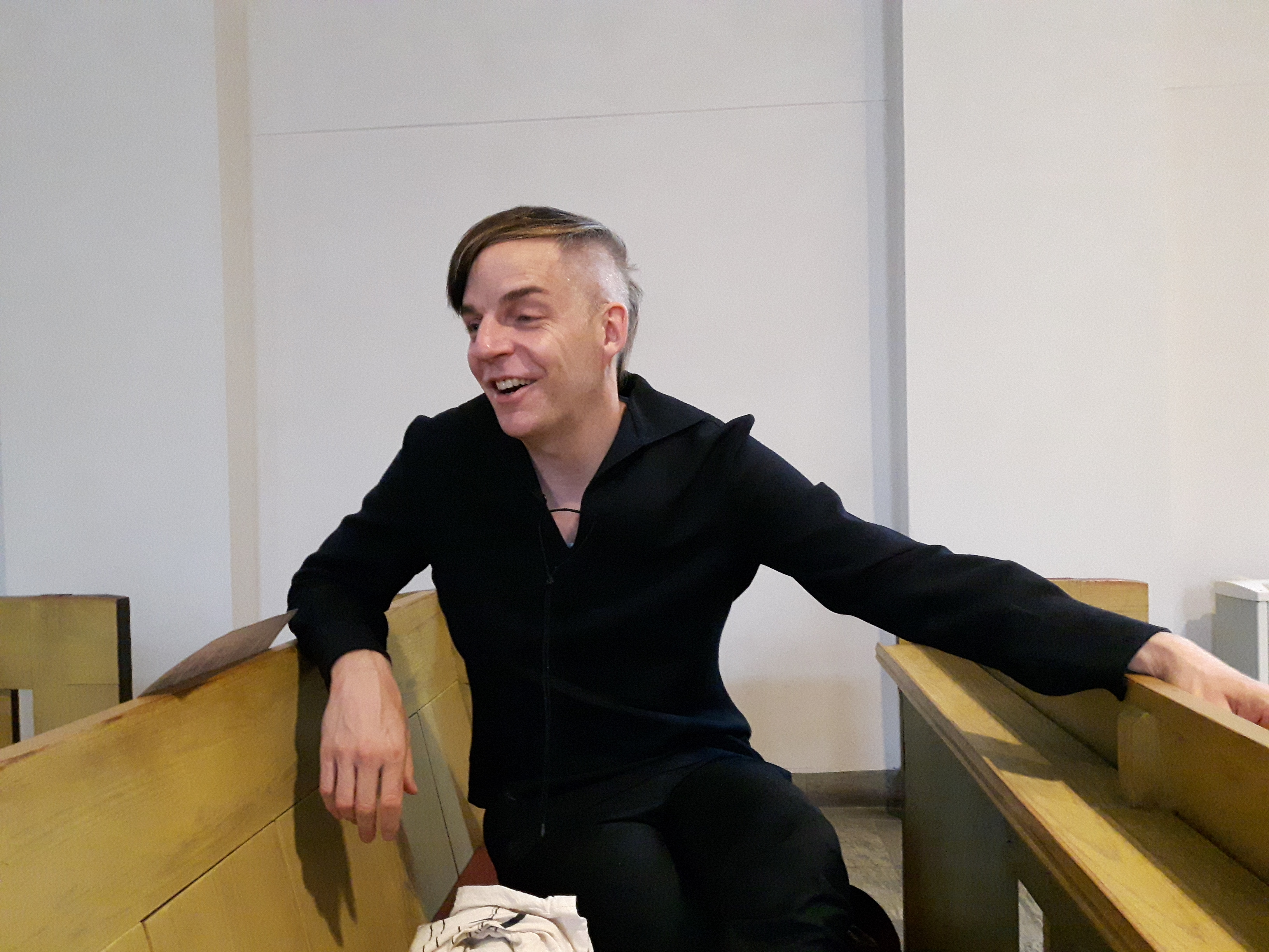 Tonsättaren Mikael Karlsson (f. 1975)